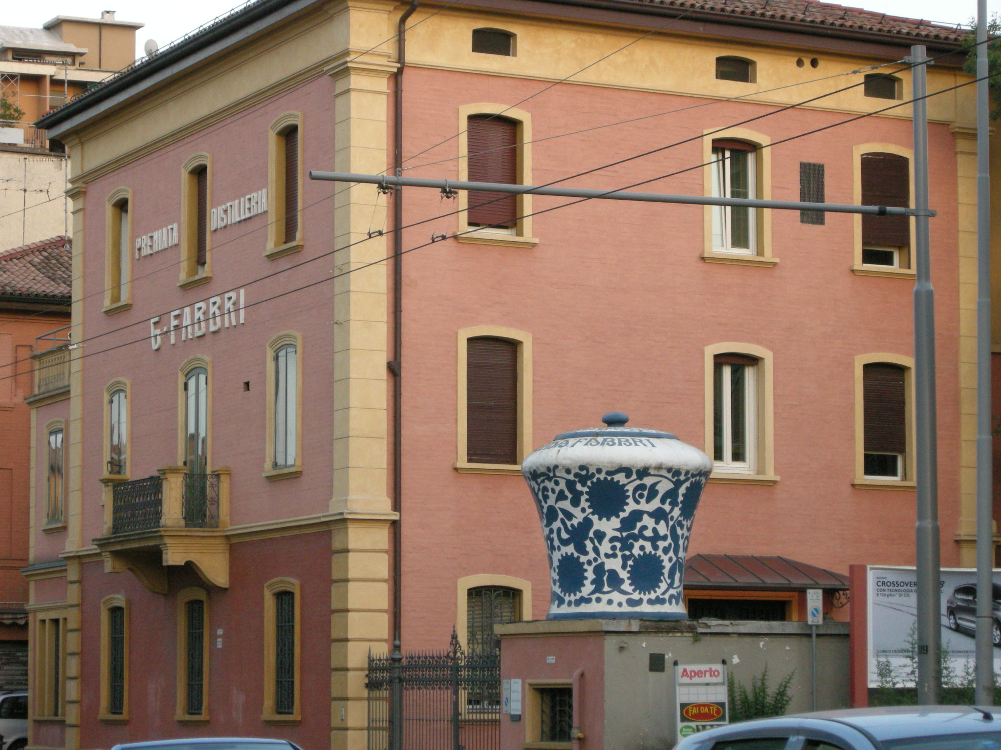 Borgo panigale, via emilia, manifattura fabbri